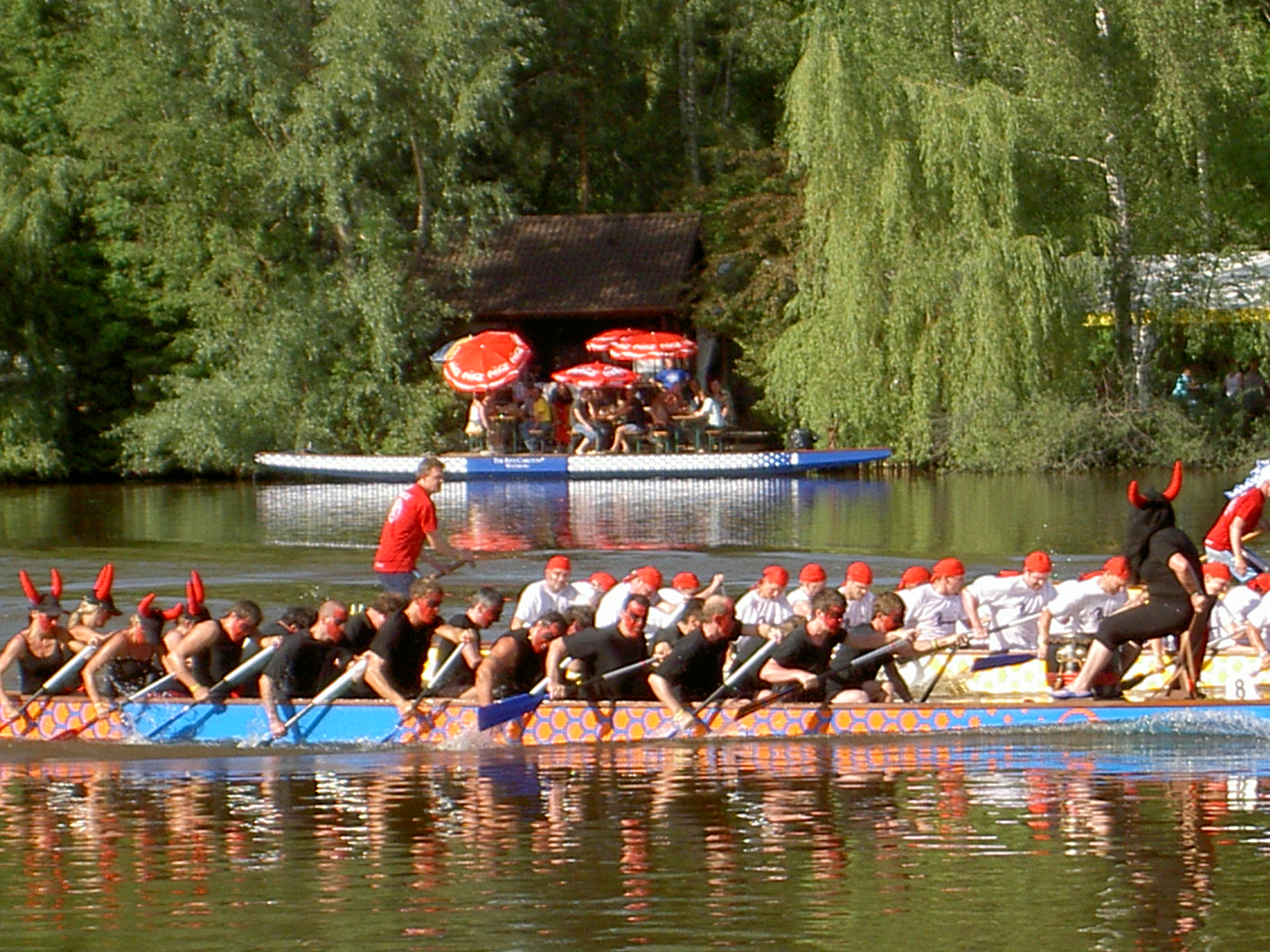 Beim ersten Drachenboot-Rennen am Bürmooser See (Bürmoos, Bezirk Salzburg-Umgebung, Land Salzburg) im Juni 2006. Es folgten einige weitere Veranstaltungen dieser Art in den Jahren darauf.